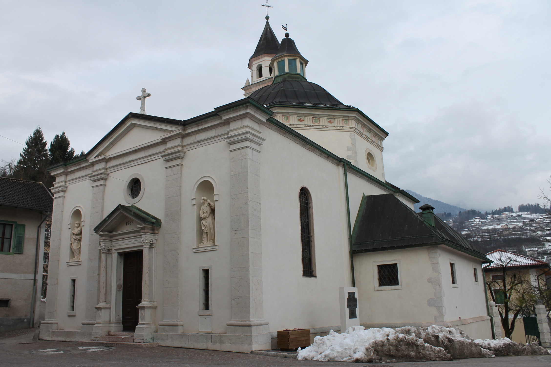 Carzano, la chiesa della Madonna della Neve.